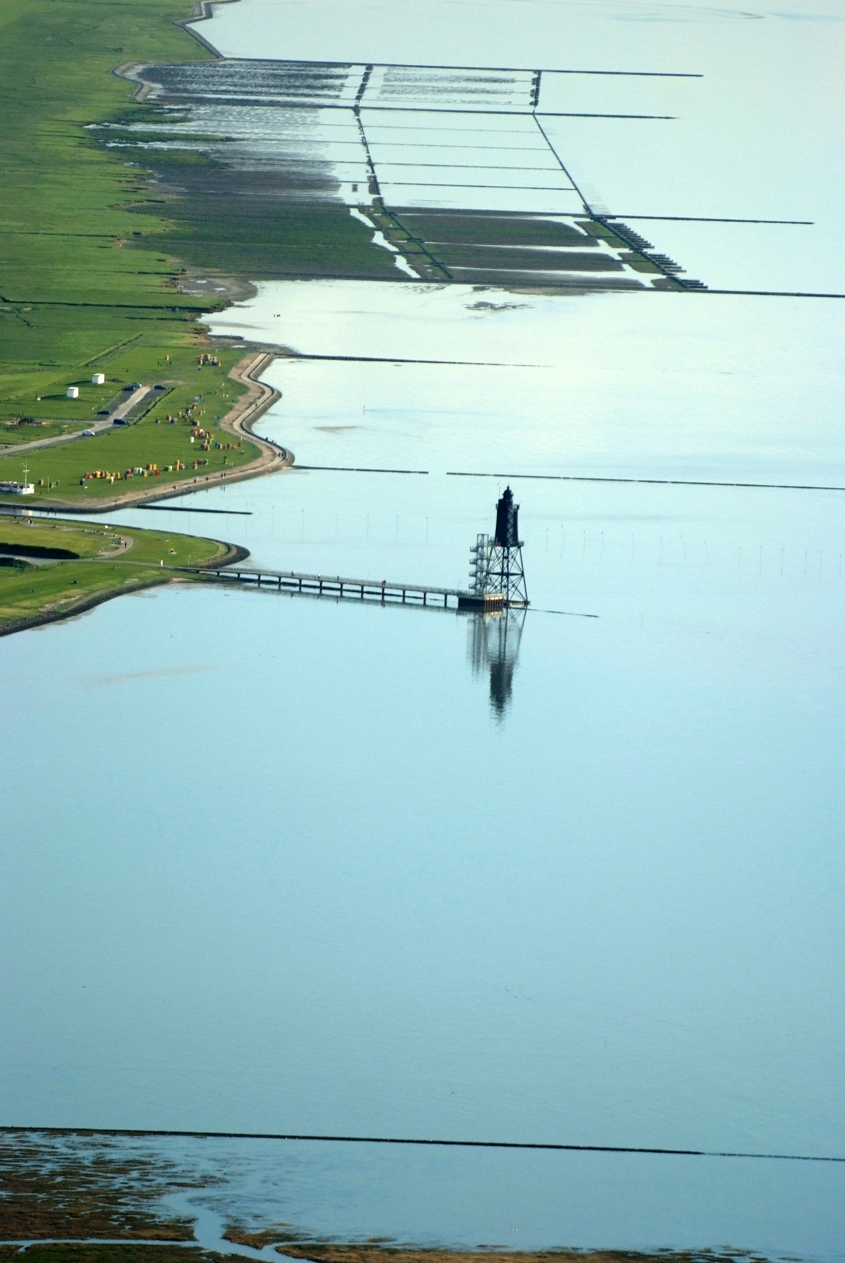 Leuchtturm Obereversand vor Dorum-Neufeld Fotoflug vom Flugplatz Nordholz-Spieka über Bremerhaven, Wilhelmshaven und die Ostfriesischen Inseln bis Borkum